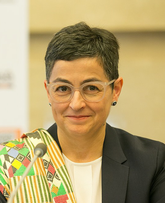 Arancha González (2019), spanische Ökonomin, UN-Funktionärin und seit 2020 spanische Außenministerin